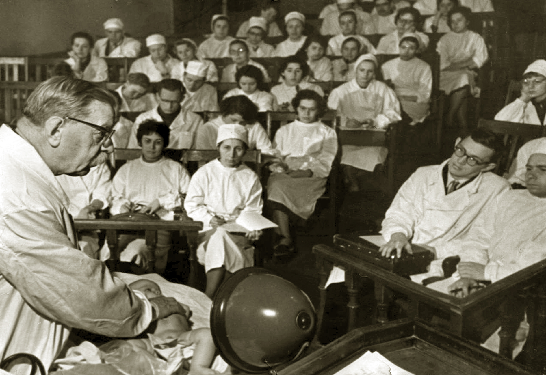 Лекция по факультетской педиатрии в ЛПМИ